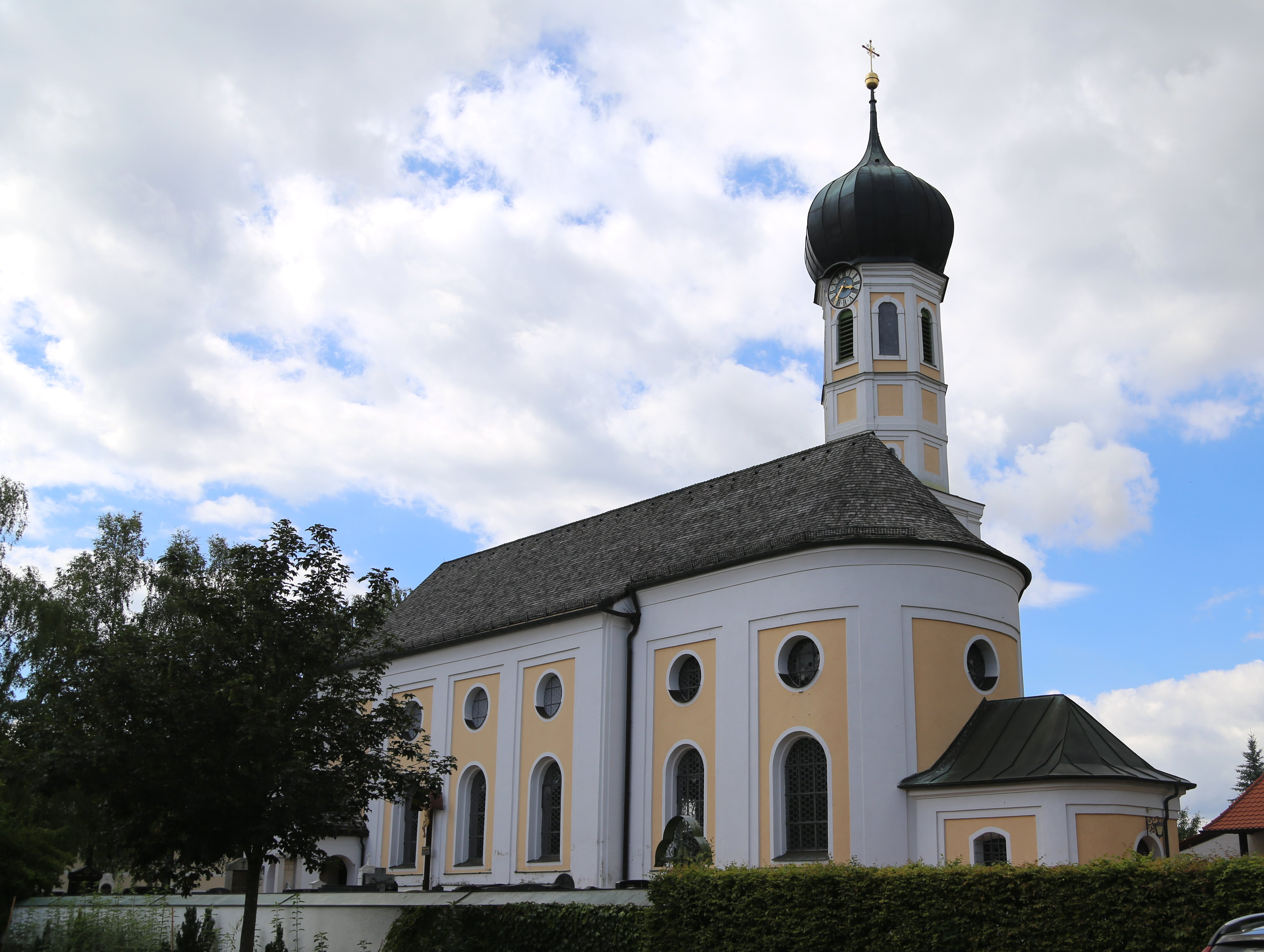 Katholische Pfarrkirche Hl. Kreuz, stattlicher Barockbau,1701–1723 von Johann Georg Ettenhofer erbaut; mit Ausstattung; Friedhof mit Grabdenkmälern, Ende 19./Anfang 20. Jahrhundert.